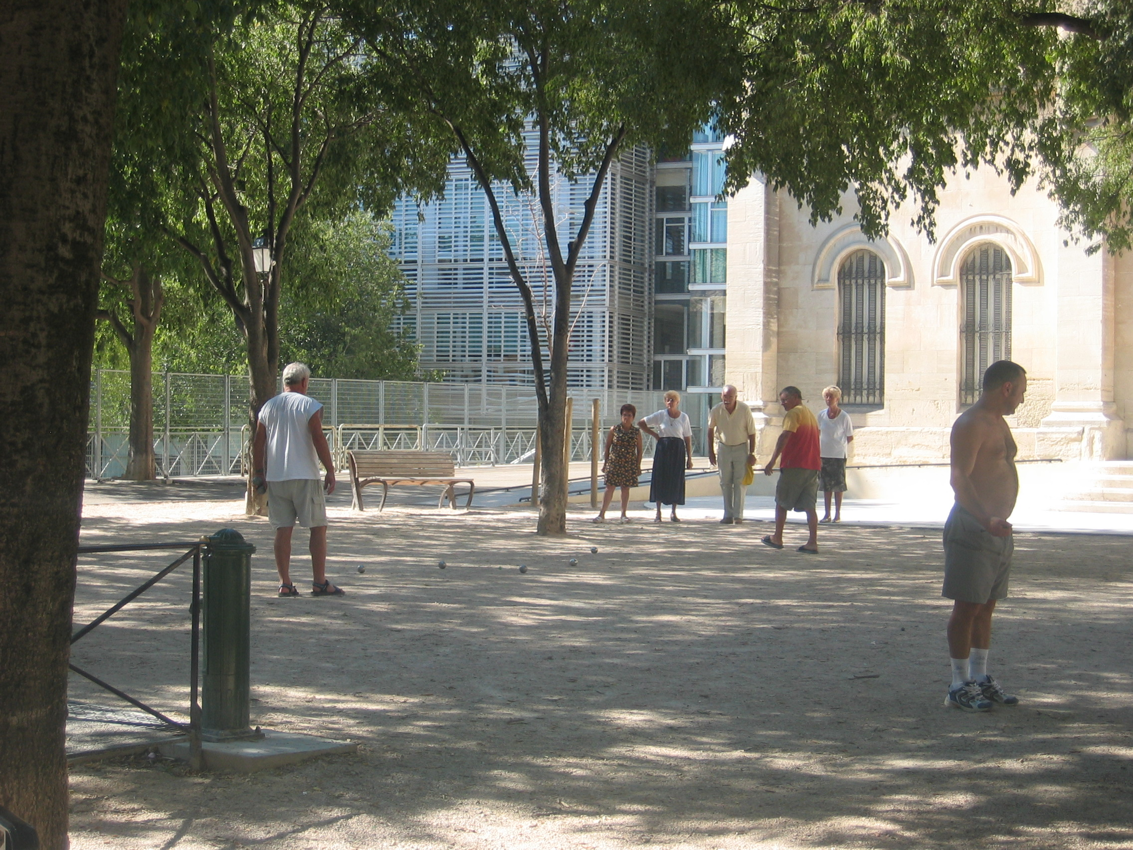 Boulistes à la Placette , photo personnelle de Nicolas Cadène